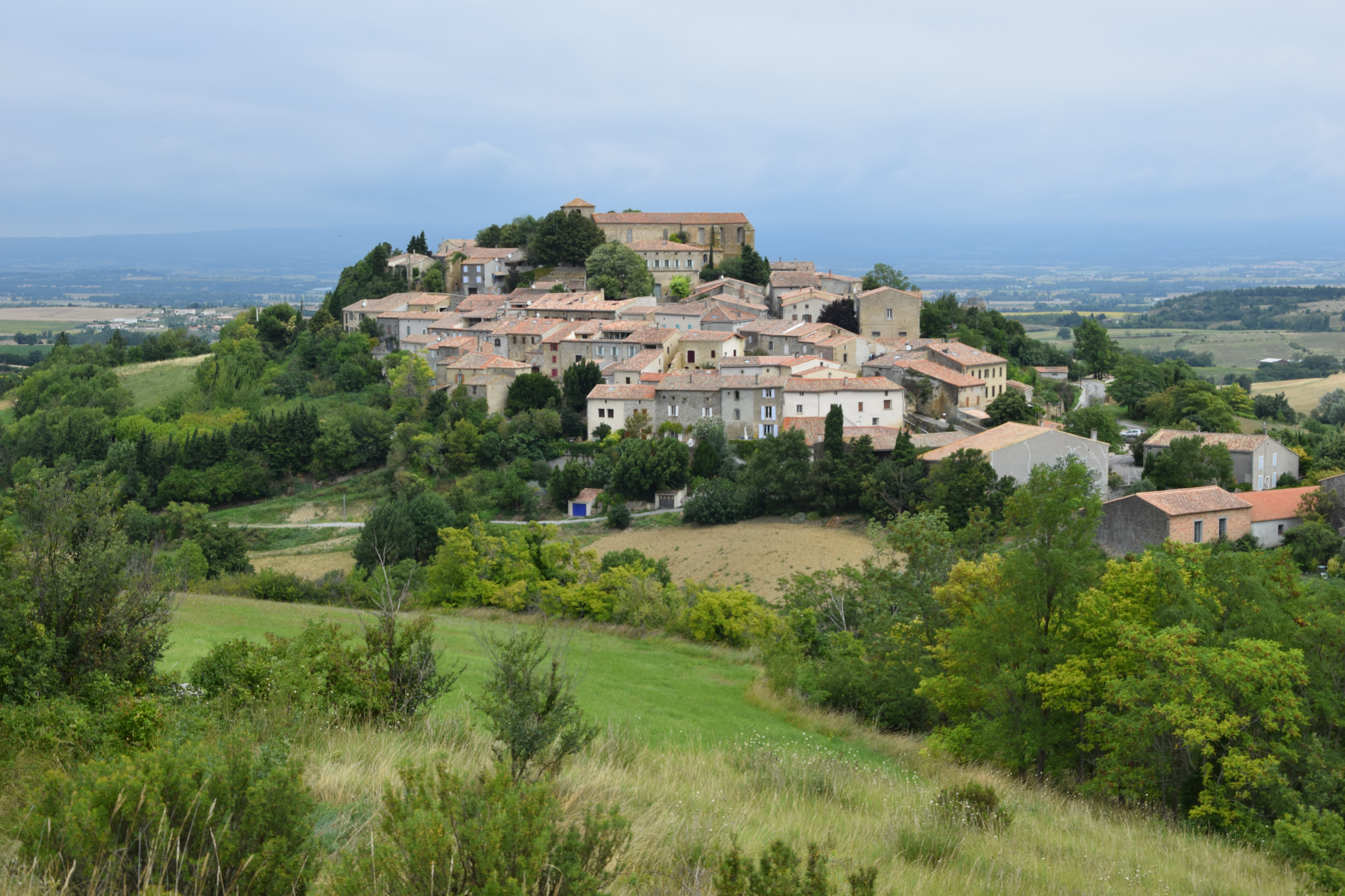 Église Saint-Laurent de Laurac